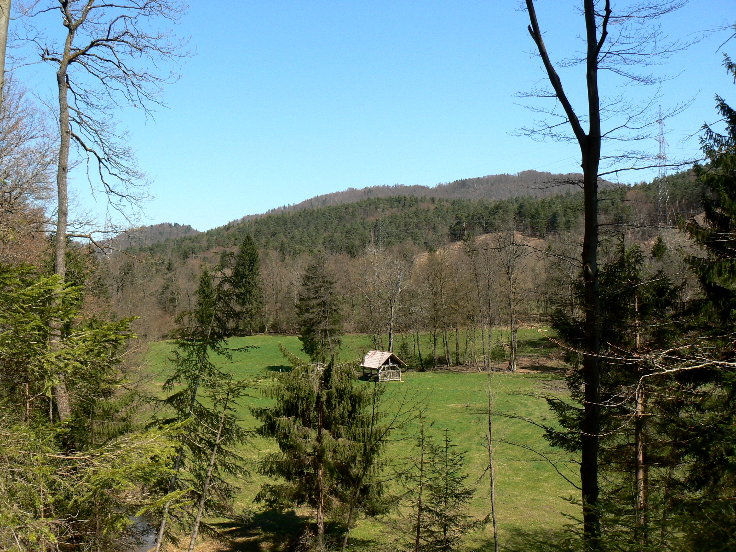 Pašniki v Sračji dolini